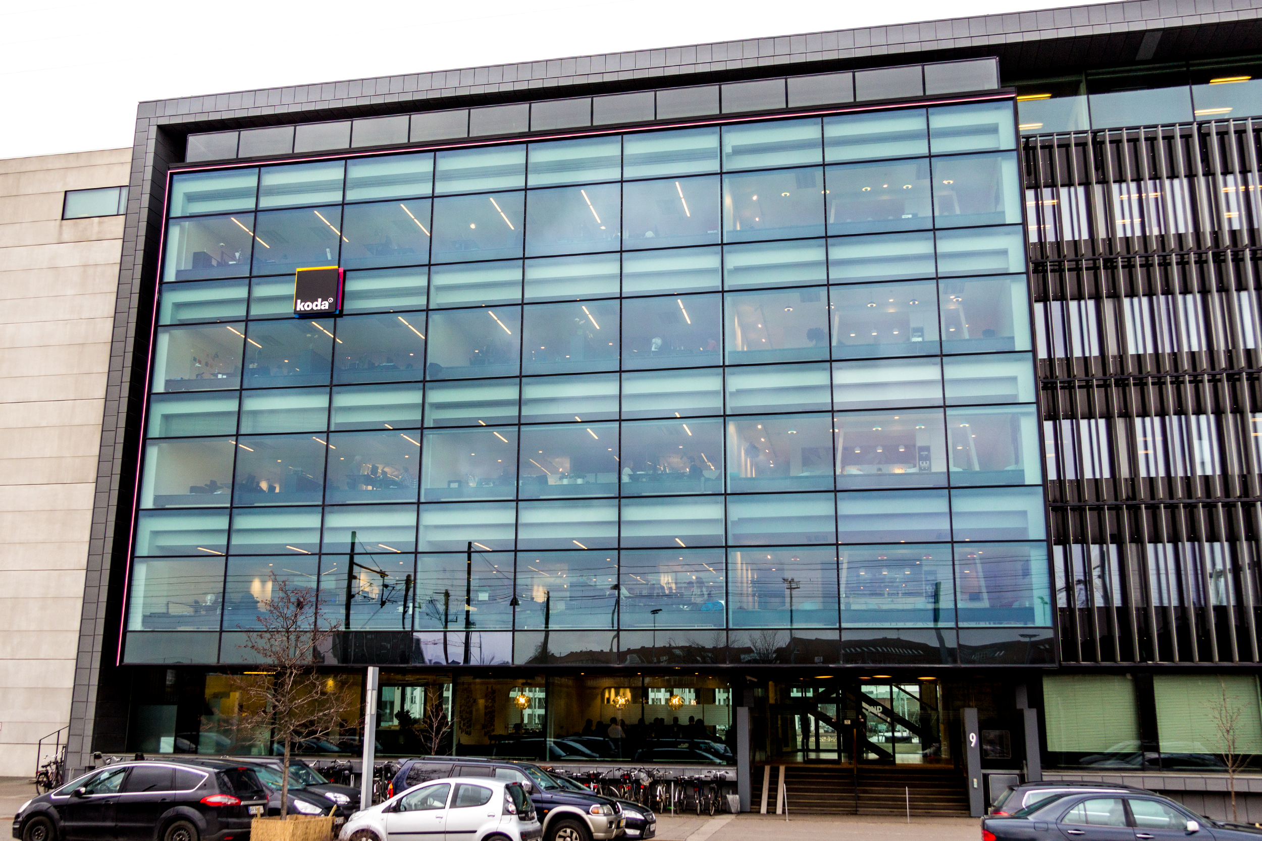 Kodas hovedkvarter i Nordhavn i København